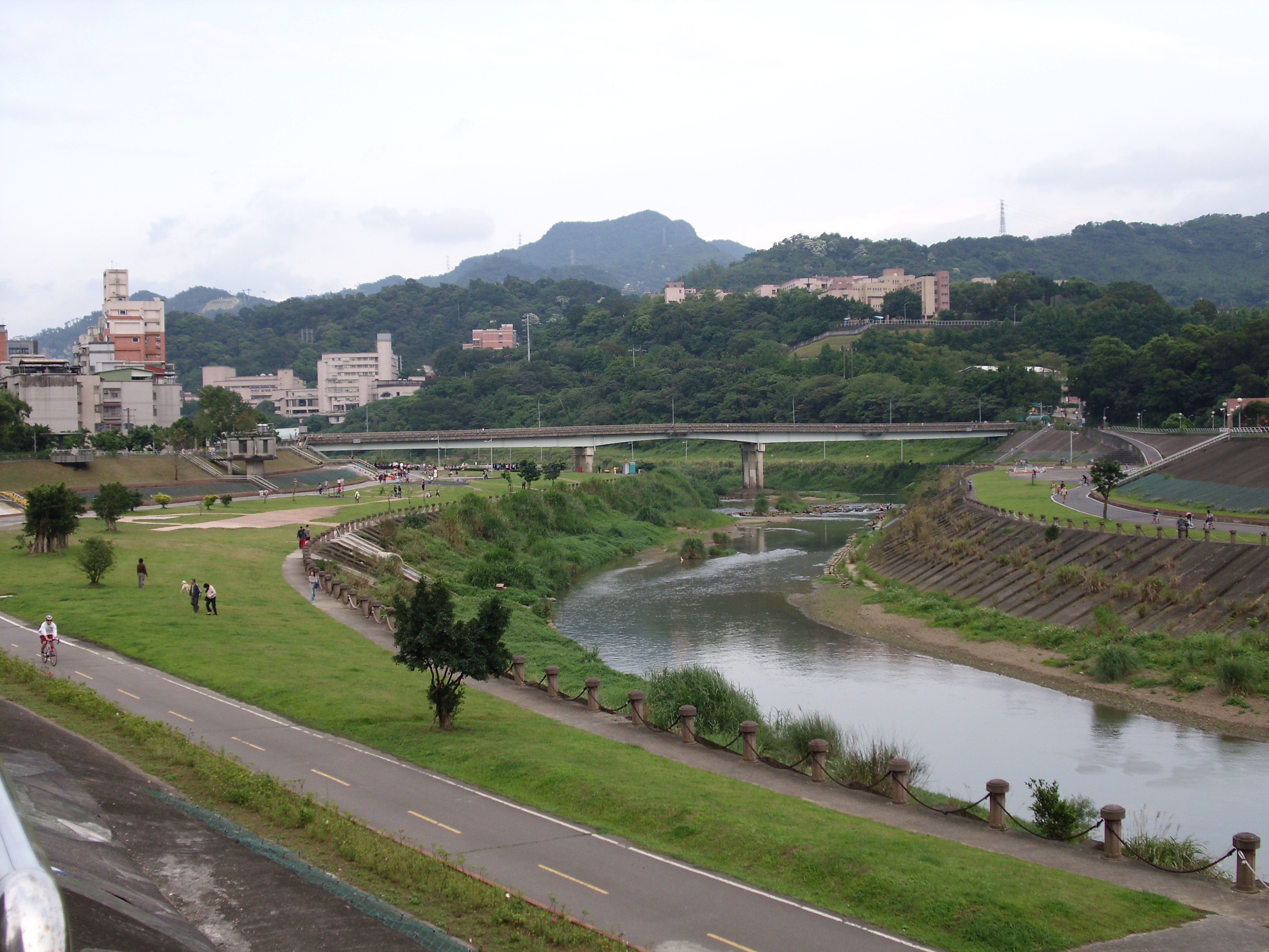 中文（台灣）: 景美溪左右岸親子生活自行車道，前方為恆光橋。